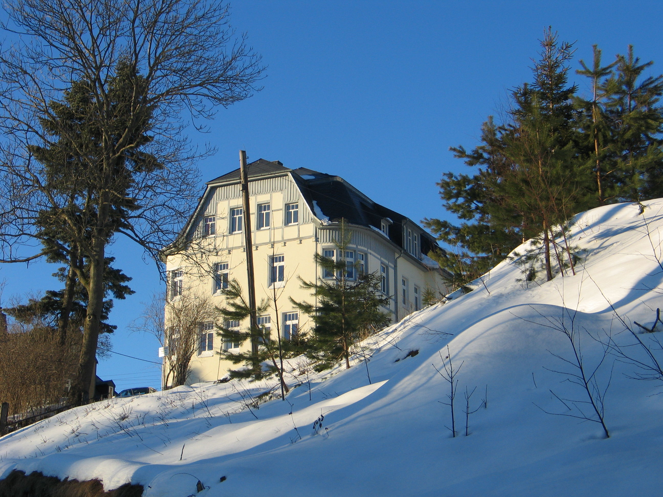 Wohnhaus stark ortsbildprägend, in stattlicher Ausprägung.